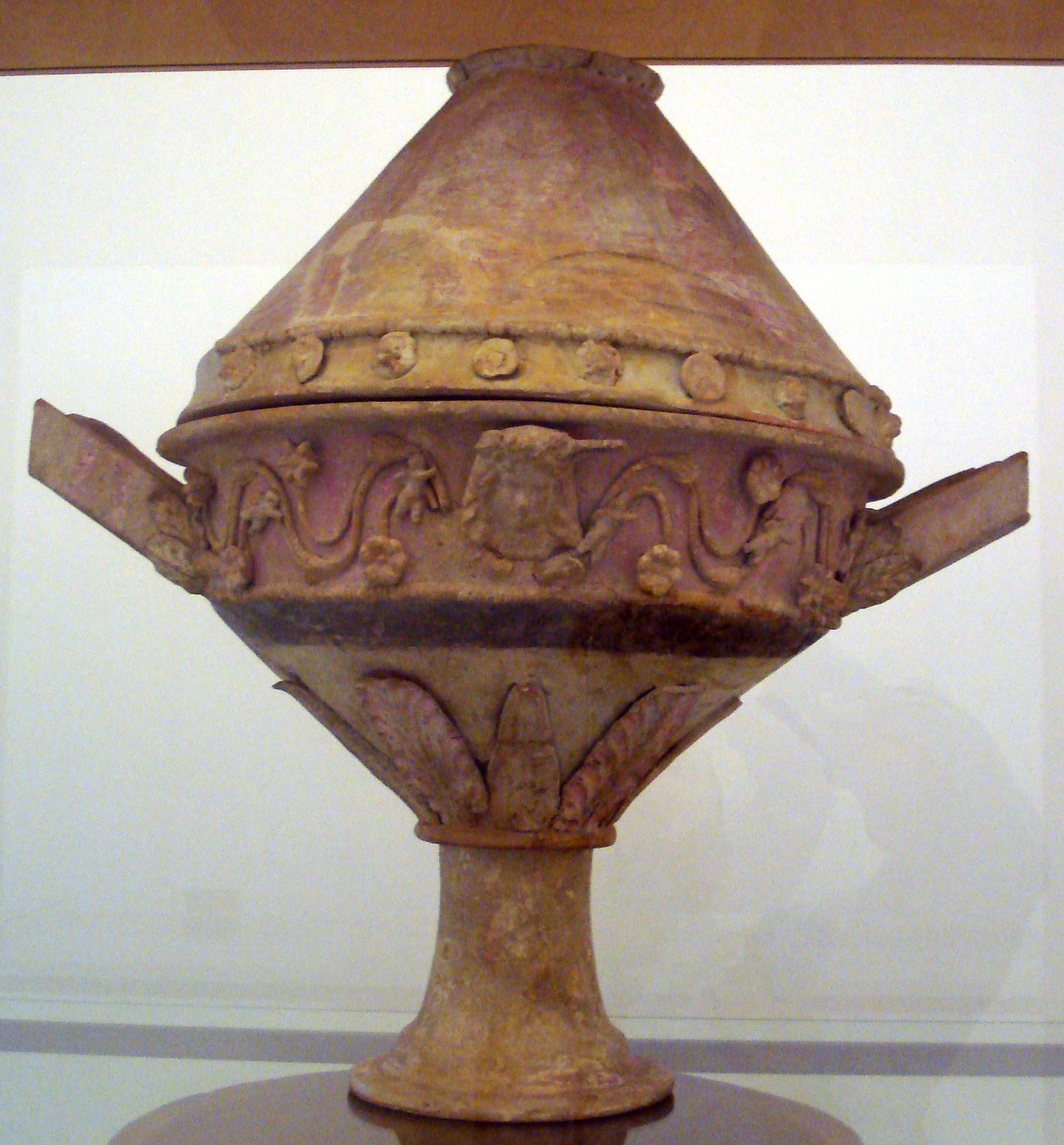 "Vaso centuripino" (280/220 a.C.), esempio della splendida e caratteristica produzione di terracotta policroma ellenistica di Centuripe (Enna). Museo archeologico regionale di Palermo, 28 settembre 2006. Foto di Giovanni Dall'Orto.